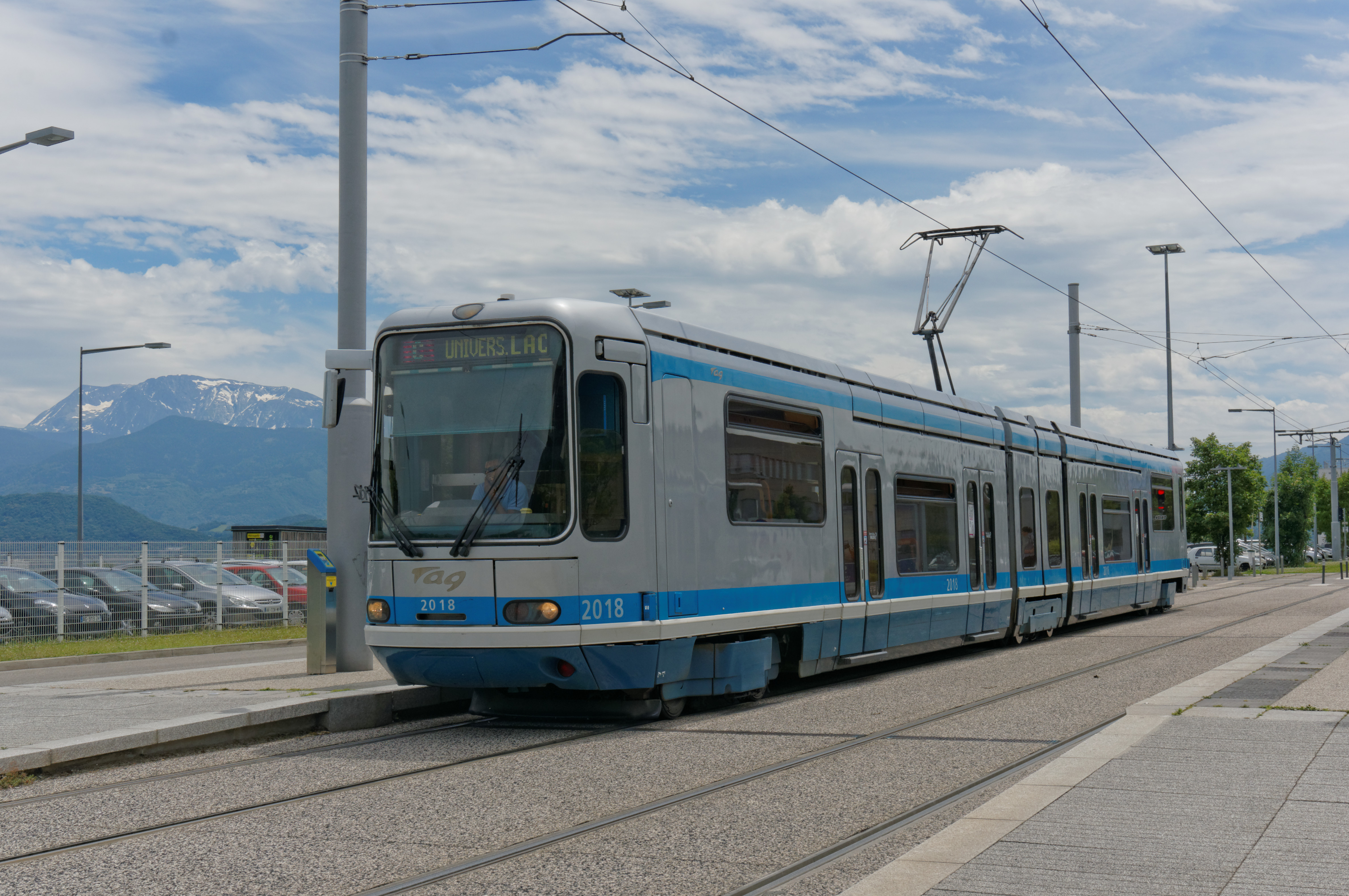 Le tramway Alsthom TFS n°2018 du réseau TAG sur la ligne C à la station "Le Prisme" à Seyssins